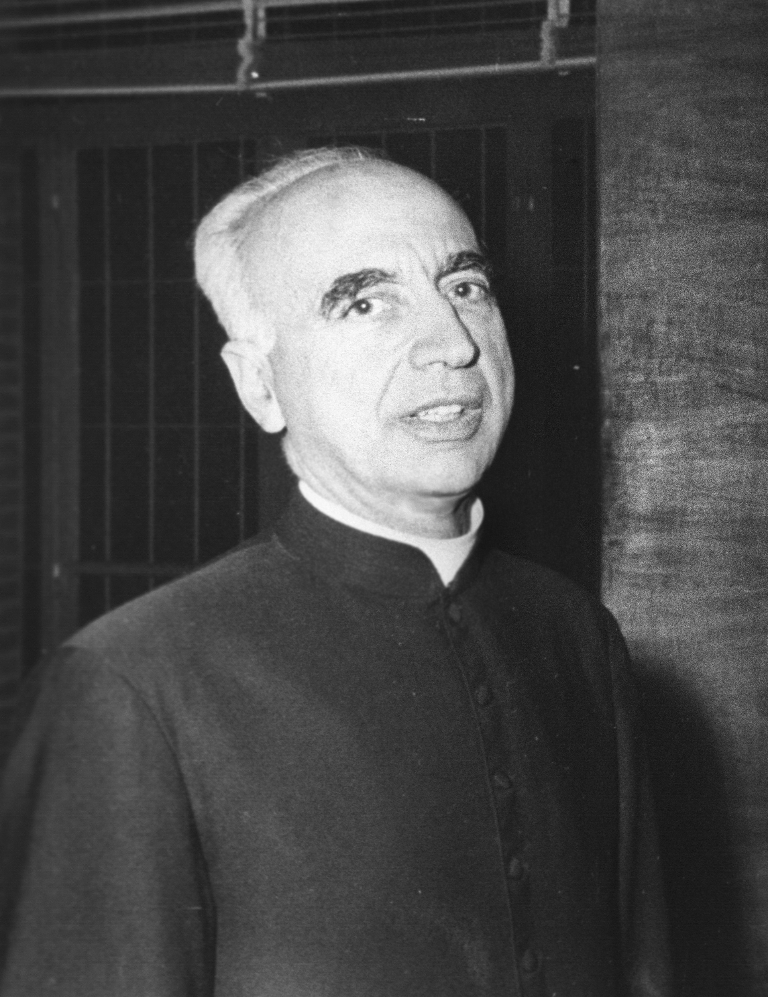 José Mª Albareda, Rector de la Universidad de Navarra